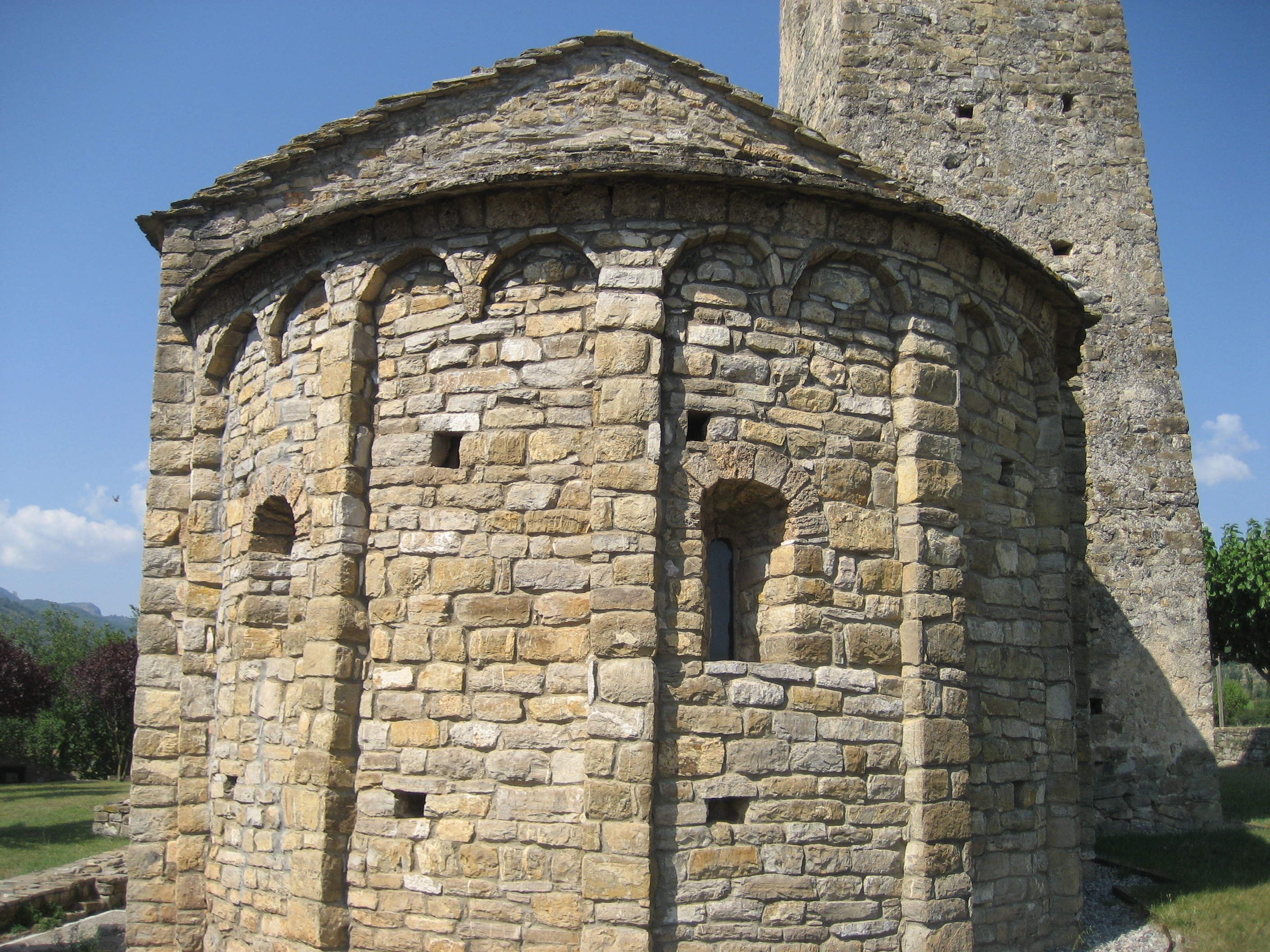 Abside de la iglesia de Sant Climent de Coll de Nargó, província de Lérida (España)